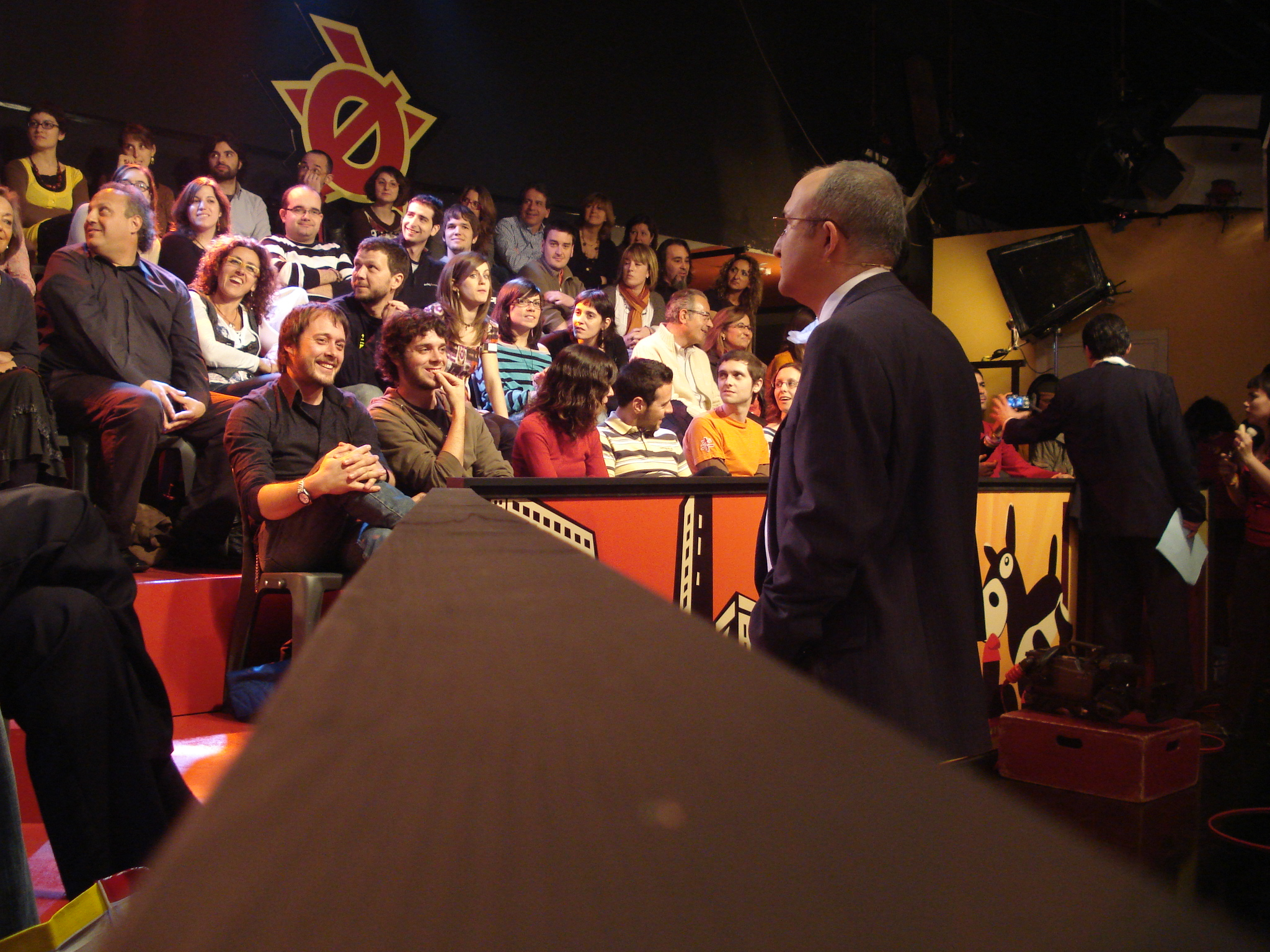 Polònia, Especial eleccions, març 2008. Amb Sergi Mas com Montilla, president de la Generalitat.